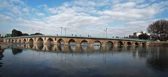 گرفته شده توسطشهرداری محترم /بارگزاری علی اکبری